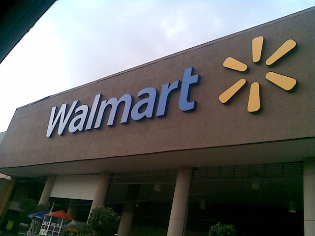 Un Wal-Mart remodelado en la Ciudad de México,México.